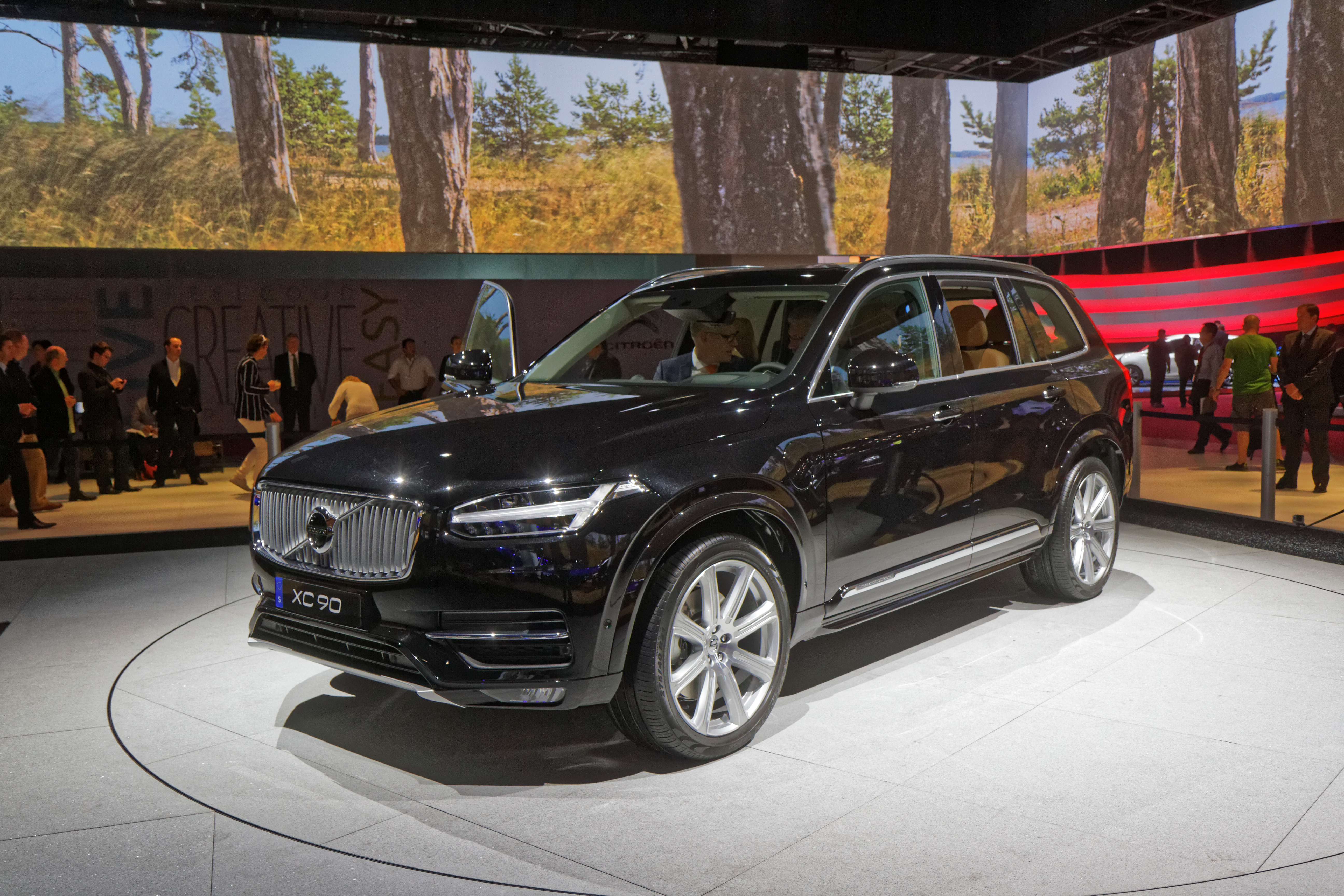 Une Volvo XC 90 présentée lors du mondial de l'automobile de Paris 2014.